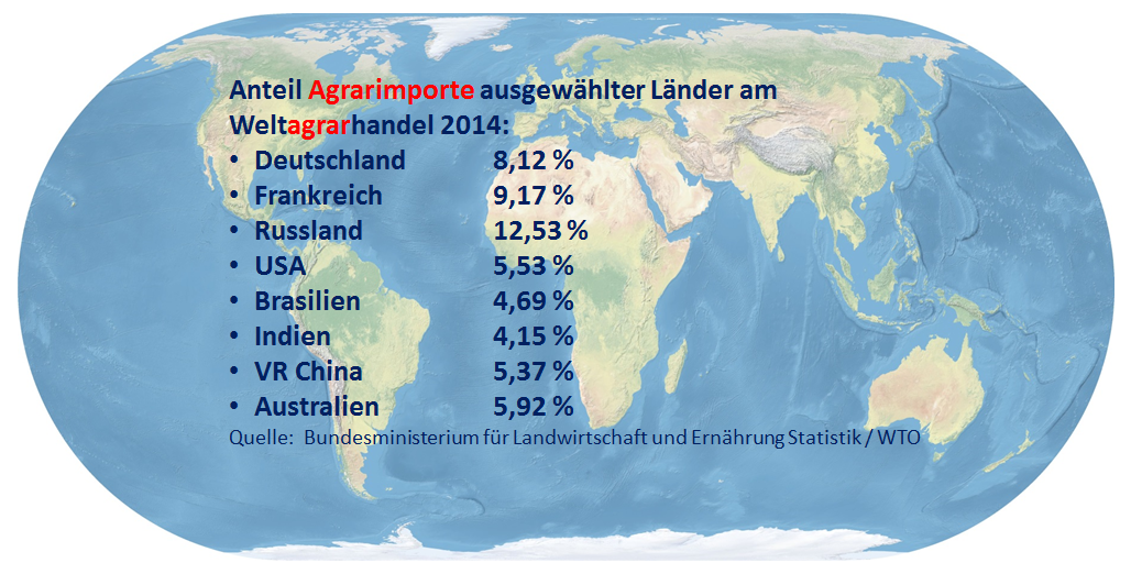 Das Bild beruht auf der Vorlage von Die angegeben Zahlen stammen vom Bundesministerium für Landwirtschaft und Ernährung und sind hier veröffentlicht